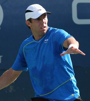 U.S. Open Sept. 4, 2010